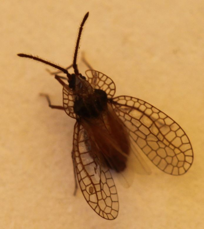 Derephysia foliacea am 8.7.2017 in der Schwetzinger Hardt